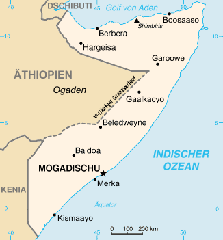 Karte von Somalia und Somaliland aus dem CIA World Factbook